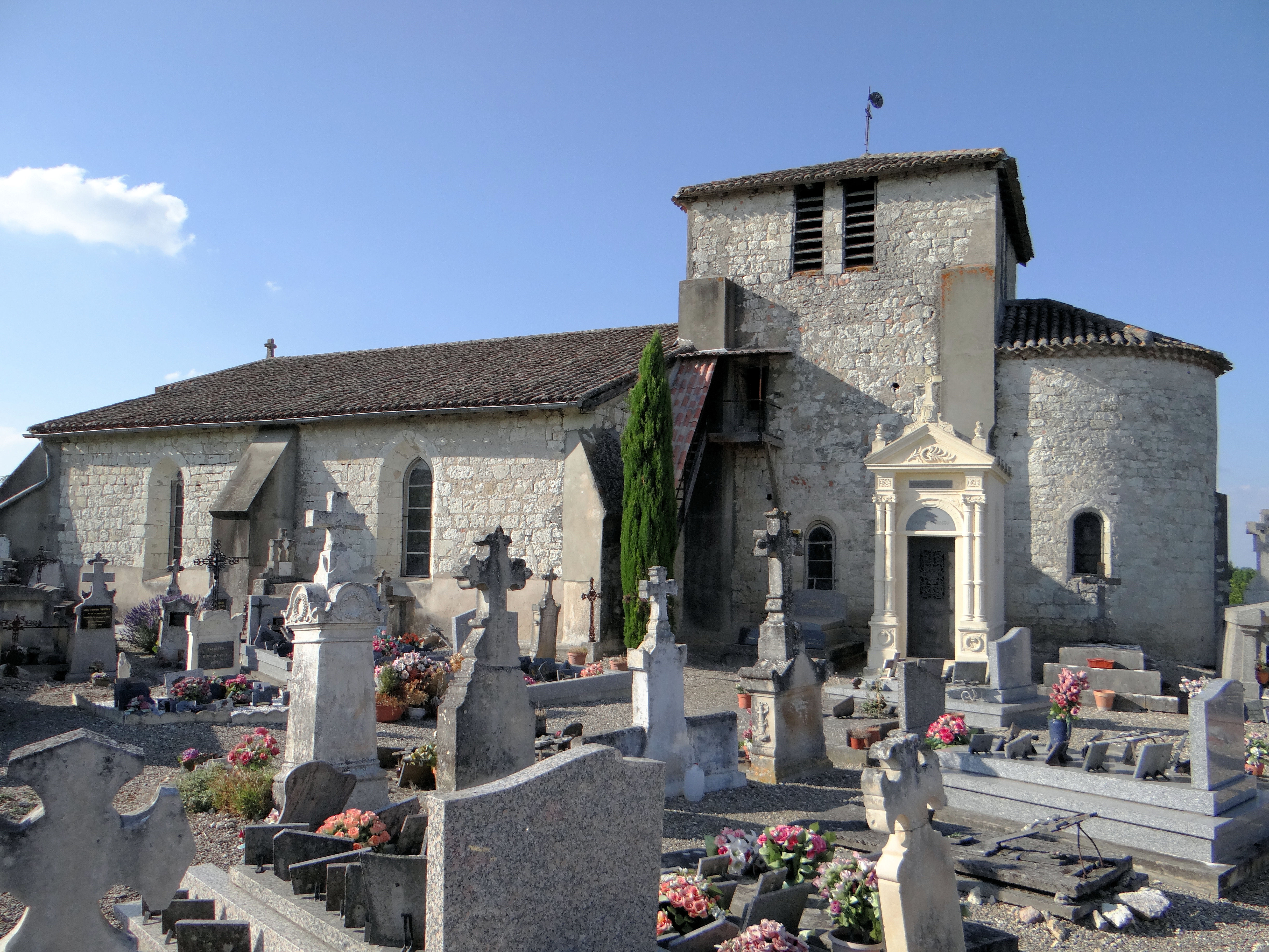 Saint-Nazaire-de-Valentane - Église Saint-Nazaire